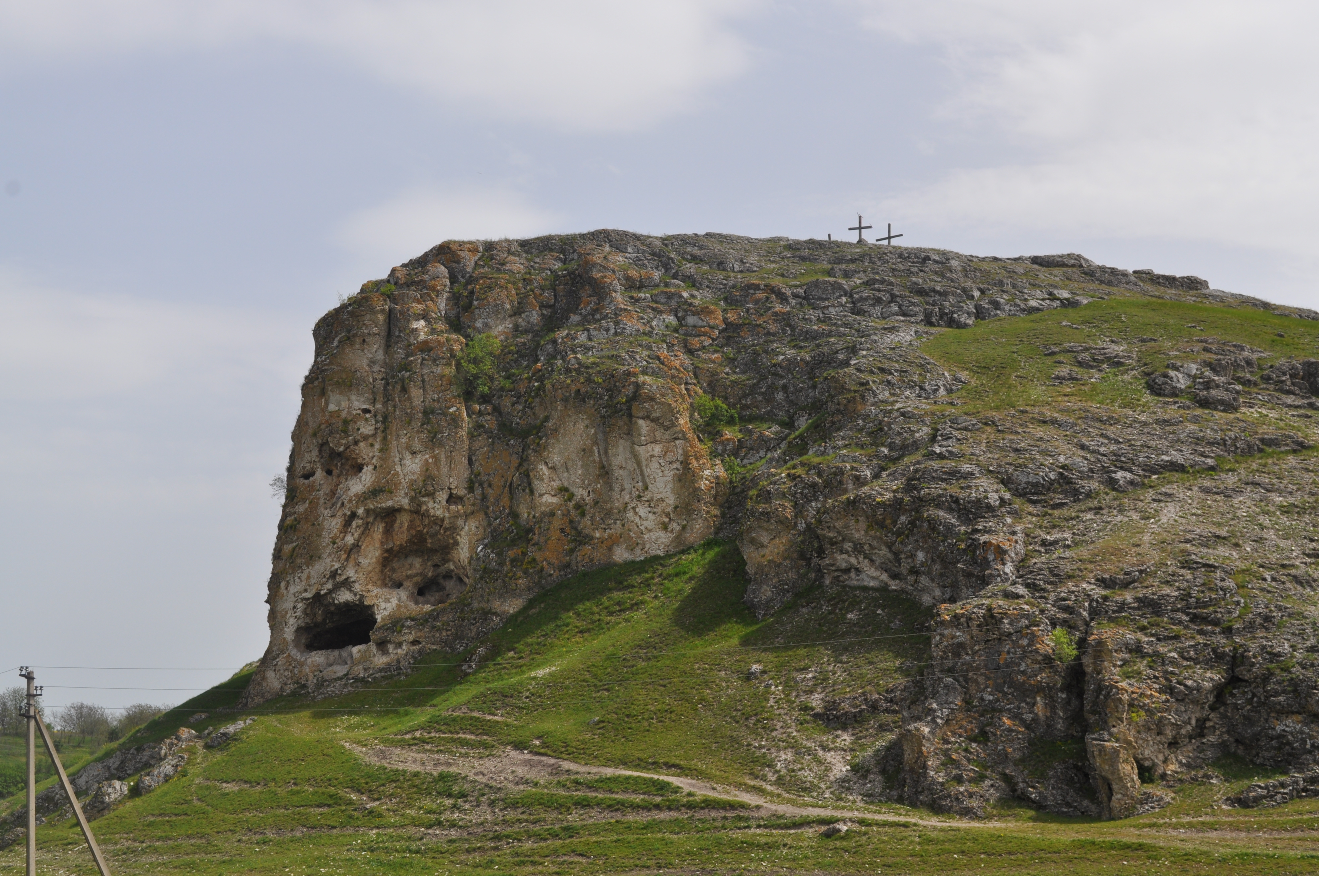 Бутештское ущелье, монумент природы, находится в Глоденский район, Южнее с. Бутешть (код MD-GL-mn.A-038)